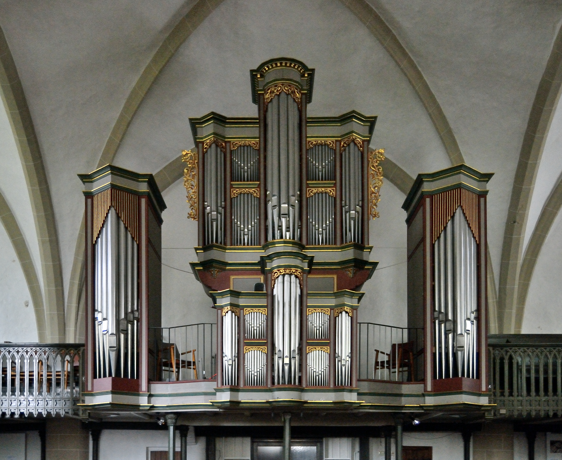 Evangelische Kirche Horn, Orgelprospekt aus dem späten 17. Jahrhundert